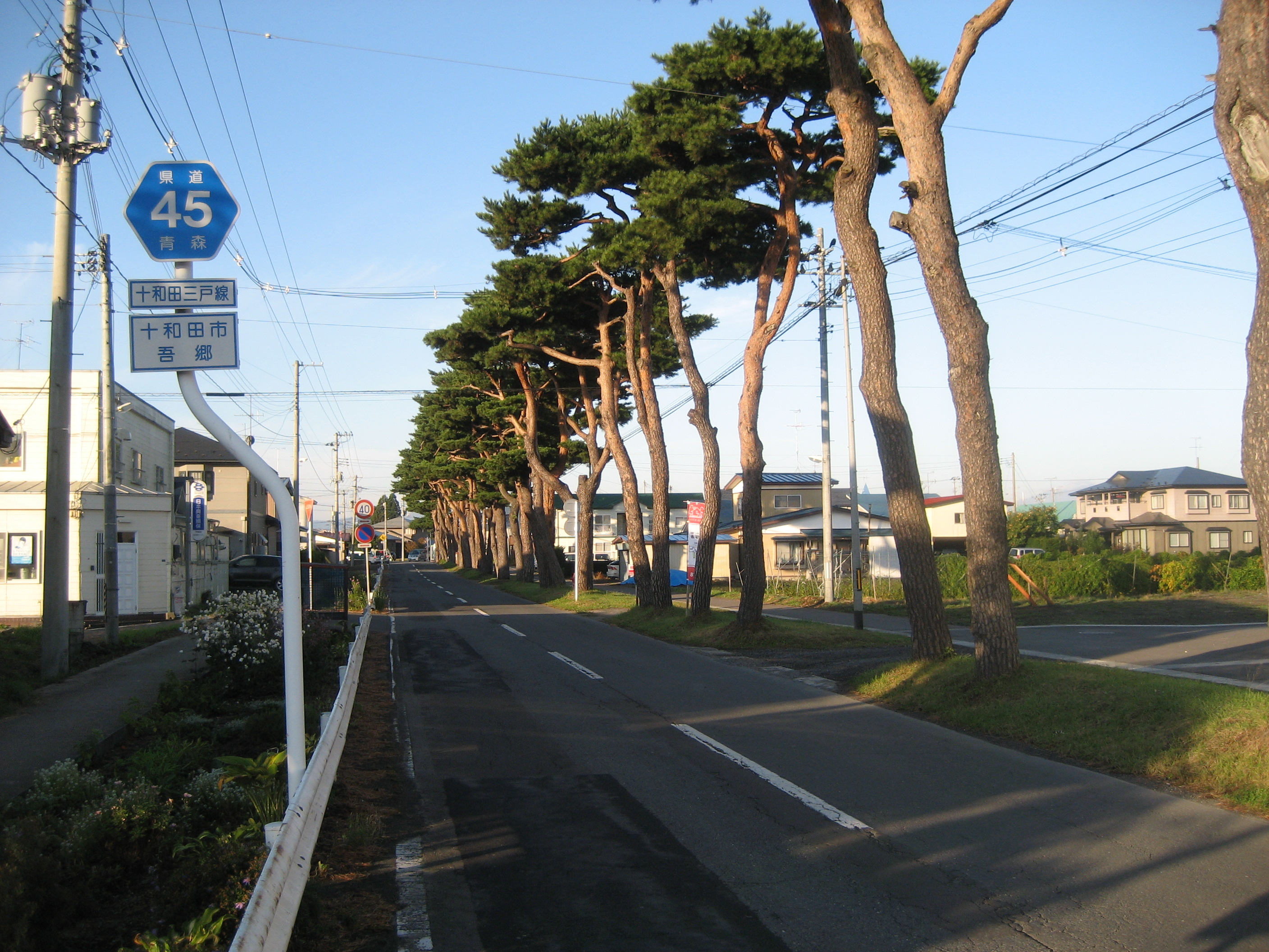 青森県道45号線十和田市吾郷付近